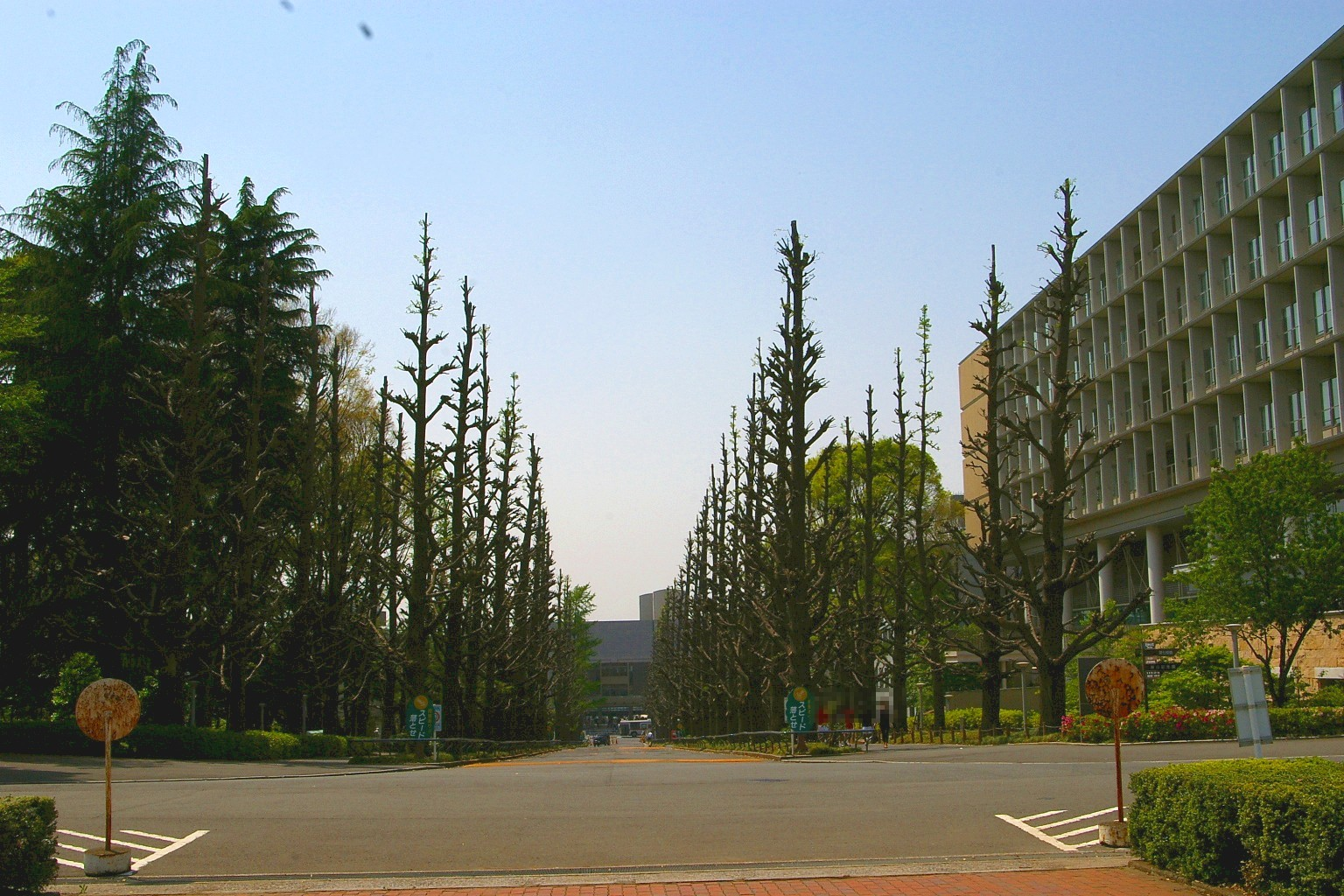 GFDL